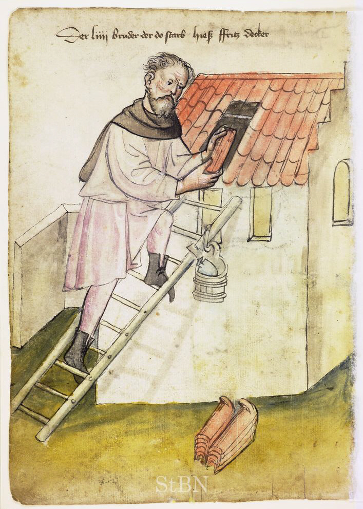 ffritz (Fritz) Decker , Decker (Dachdecker) Transkription und weitere Informationen